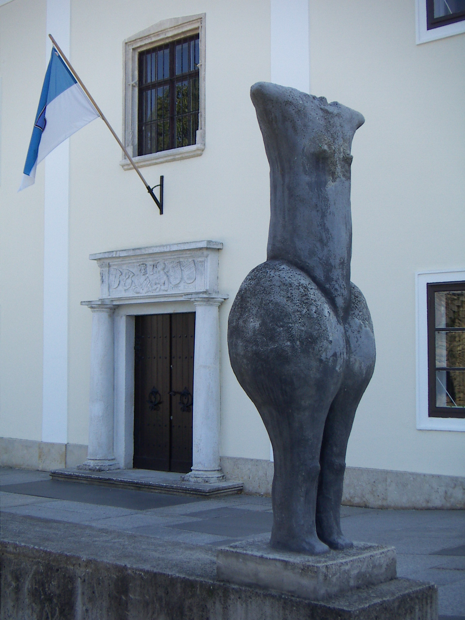 Hörbarthmuseum, historischer Eingang, die davorstehende Plastik ist eine Nachbildung der Venus von Eggendorf